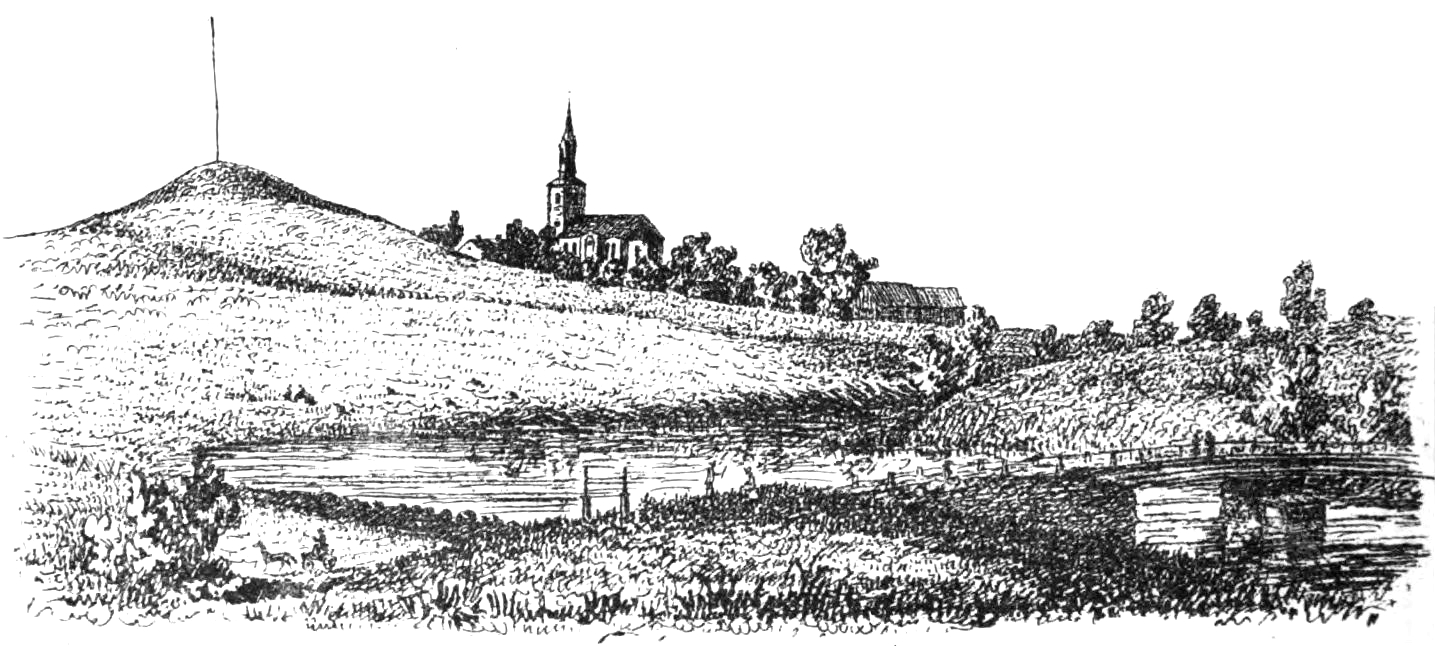 Lebergshögen (Ledbergshögen, RAÄ-nummer Ledberg 5:1) i Ledbergs socken i Östergötland. Teckning i "Utdrag af Antiqvitets-Intendenten P. A. Säves afgifna berättelse för år 1861", publicerad i Antiqvarisk tidskrift för Sverige band 1, 1864.